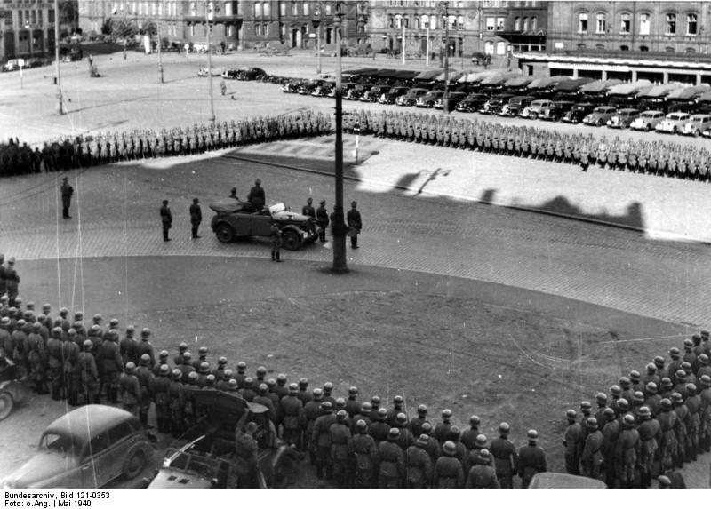 Parade Straßburg